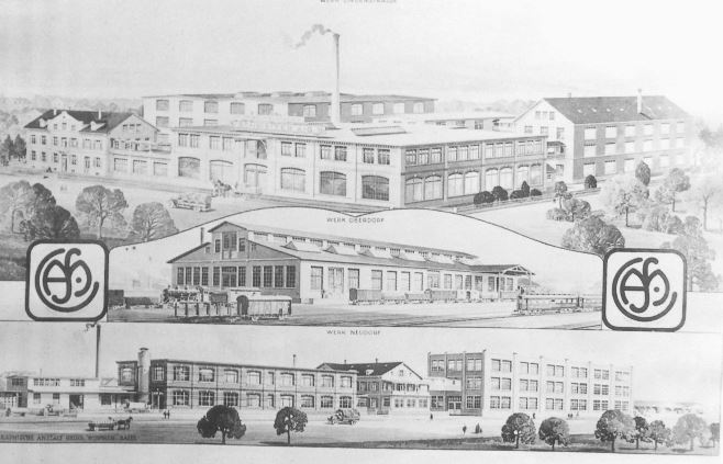 Schweiter AG, Horgen, Schweiz: Idealisierte Ansichten: Schweiter-Werke an der Lindenstrasse "Baumgärtli" Baujahr 1906 (oben), im Oberdorf (Mitte, Baujahr 1925, Hauptsitz) und im Neudorf "Wannenthal" (unten, Baujahr 1920/21), nach 1925